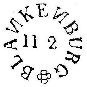 Beispiel für historische deutsche Poststempelformen: Rundstempel // Circle form with rosette in the 1836-1844 period at Blankenburg (Harz), note the wrong N